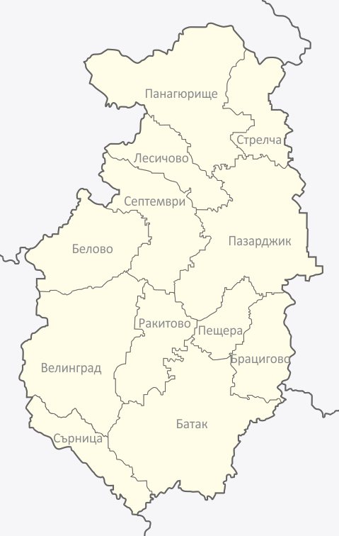 Картата е създадена от Любомир Таушанов